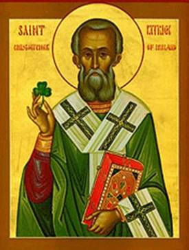 Икона святого Патрика Ирландского, XX век